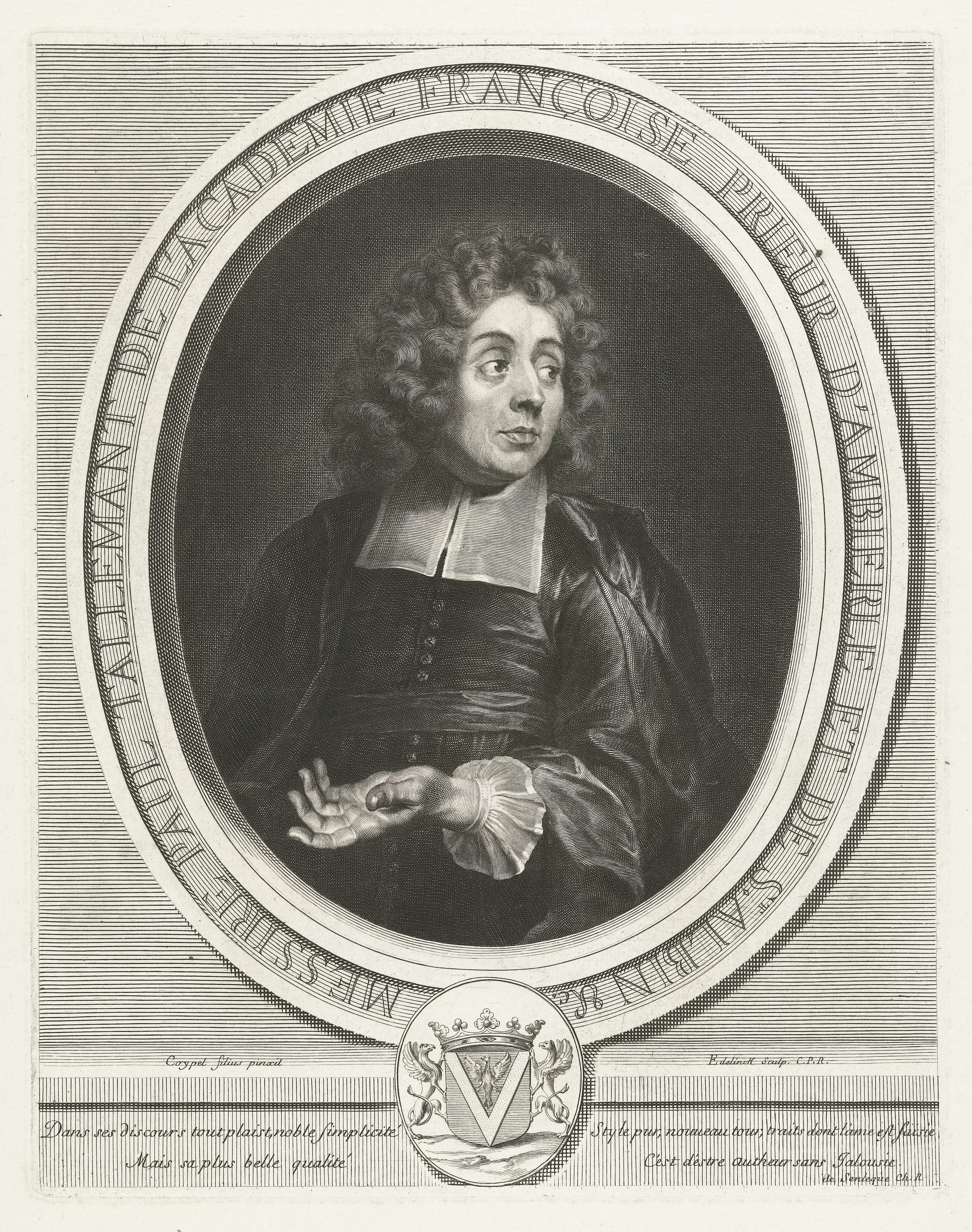 IdentificatieTitel(s): Portret van Paul TallemantObjecttype: prent Objectnummer: RP-P-BI-7405XCatalogusreferentie: Robert-Dumesnil 324-2(2)Opschriften / Merken: verzamelaarsmerk, verso, gestempeld: Lugt 240Omschrijving: Portret van de Franse geleerde en prior Paul Tallemant (1642-1712), afgebeeld in ovale omlijsting met Franse tekst. Onder de lijst een console met een wapen en aan weerszijden een vers van twee regels in Frans.VervaardigingVervaardiger: prentmaker: Gerard Edelinck (vermeld op object)naar schilderij van: Noël-Nicolas Coypel (vermeld op object)schrijver: Ch. R. de Senleque (vermeld op object)verlener van privilege: Lodewijk XIV (koning van Frankrijk) (vermeld op object)Plaats vervaardiging: prentmaker: Parijsnaar schilderij van: Parijsschrijver: onbekendverlener van privilege: FrankrijkDatering: 1666 - 1707Fysieke kenmerken: gravureMateriaal: papier Techniek: graveren (drukprocedé)Afmetingen: plaatrand: h 326 mm × b 257 mmOnderwerpWie: Paul TallemantVerwerving en rechtenVerwerving: overdracht van beheer 1816Copyright: Publiek domein